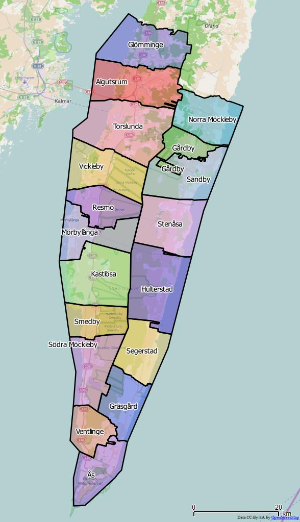 Distriktsindelningen i Mörbylånga kommun World file: 119.86341118821846408 0 0 -119.86341118821846408 1807071.88149677612818778 7715231.57851058430969715